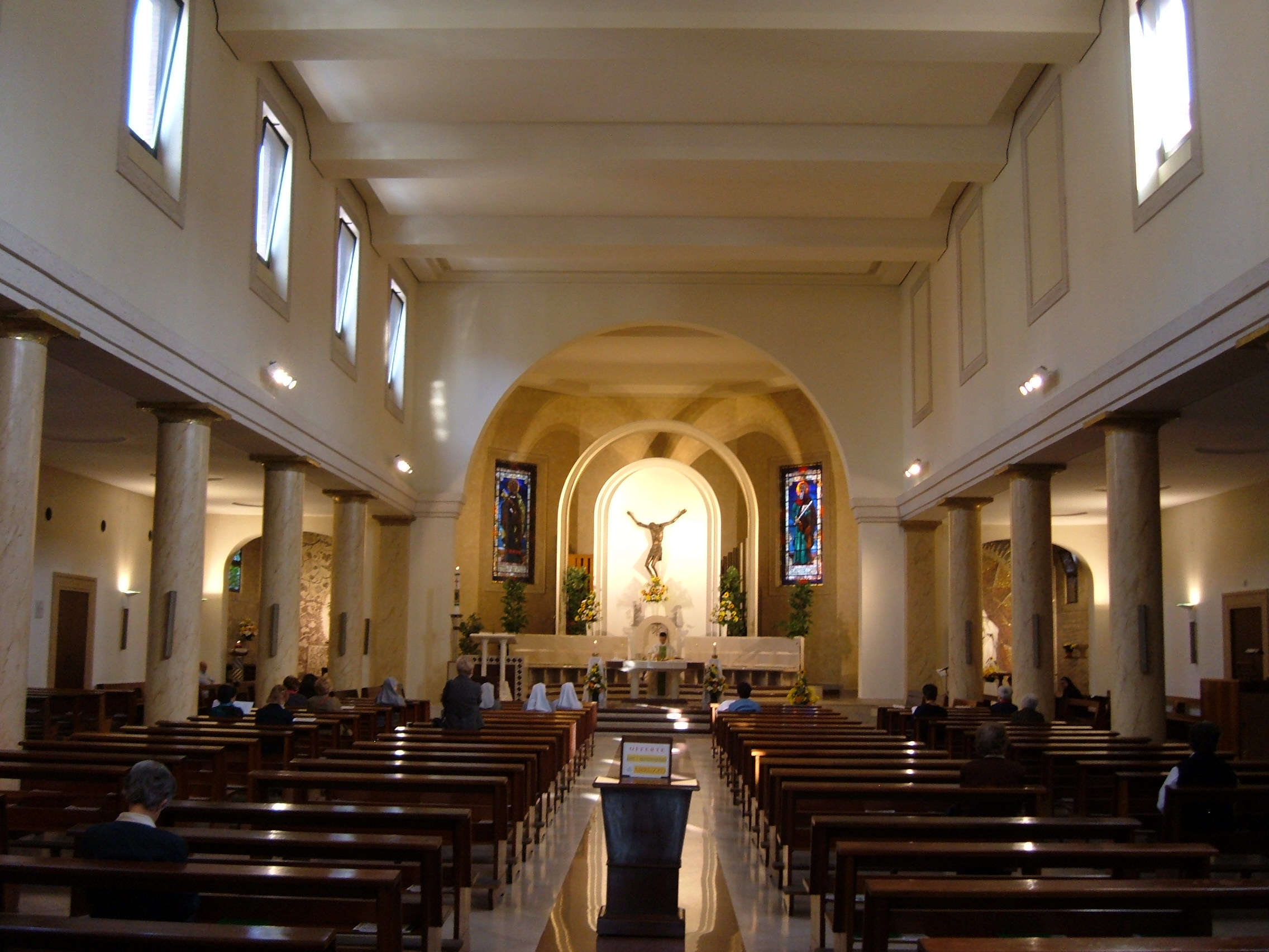 Chiesa di Santa Lucia, a Roma, nel quartiere della Vittoria. Interno.